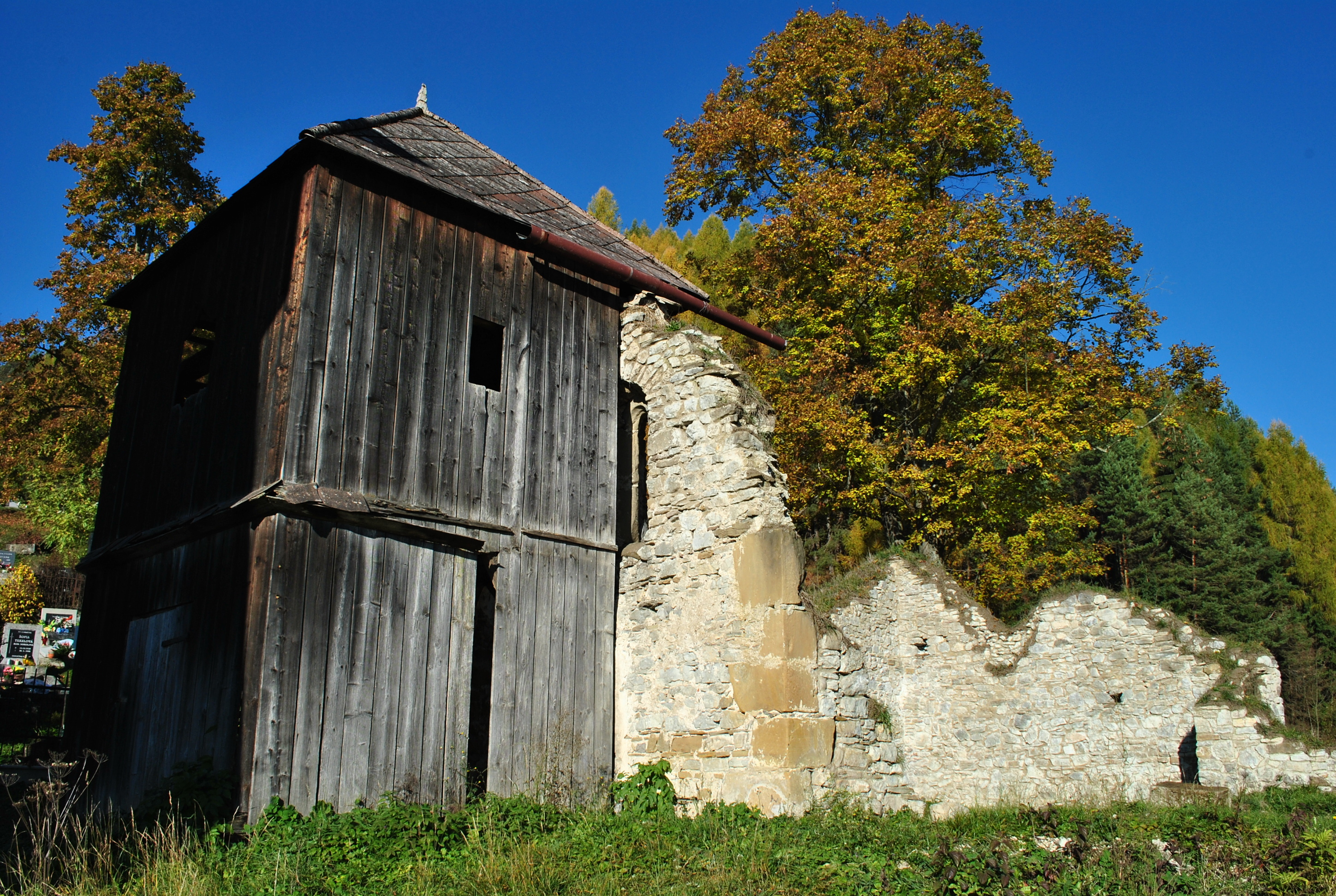 Liptovská Anna, okr. Liptovský Mikuláš - zaniknutý kostol